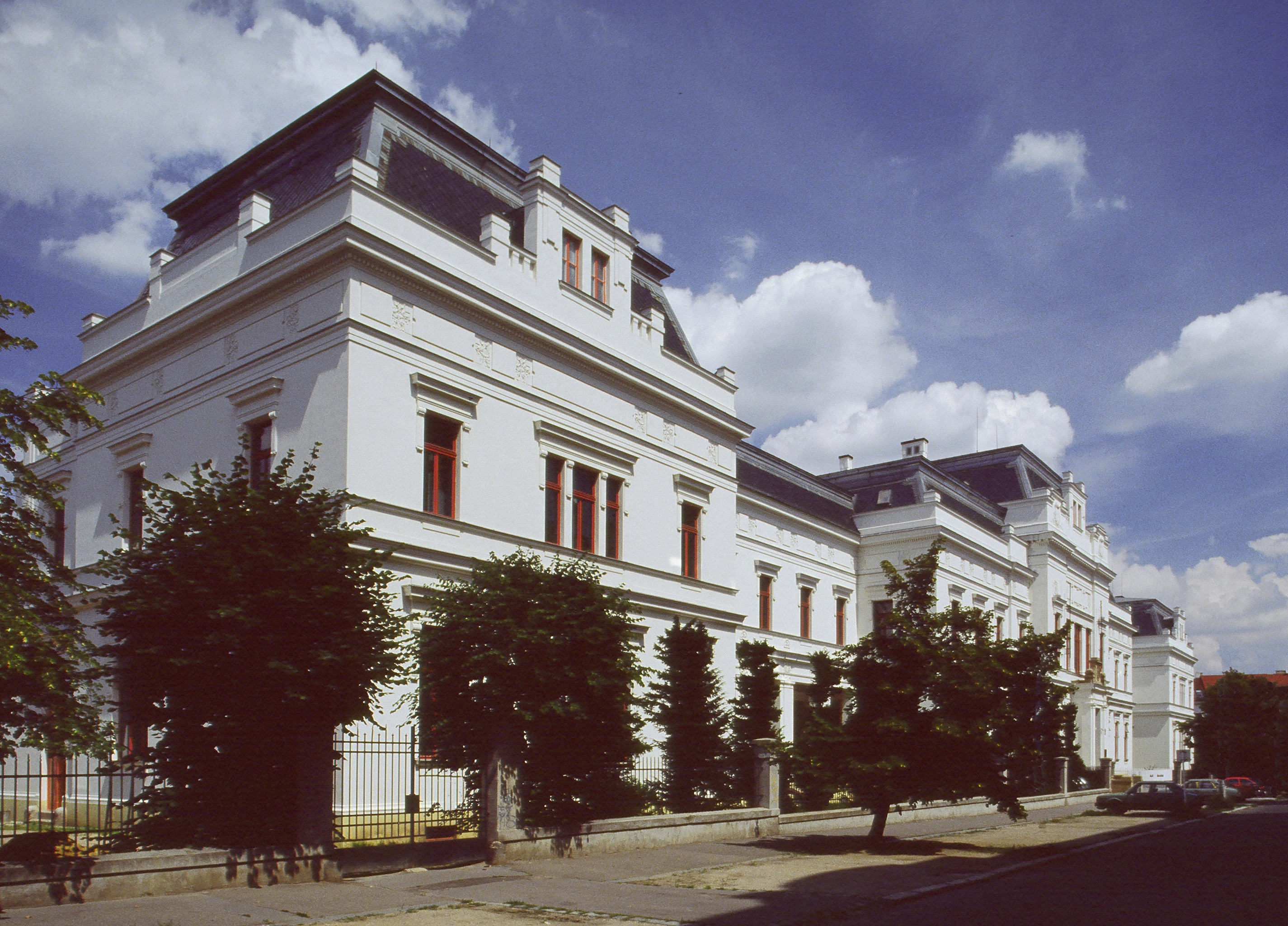 Průčelí hlavní budovy Akademie výtvarných umění v Praze